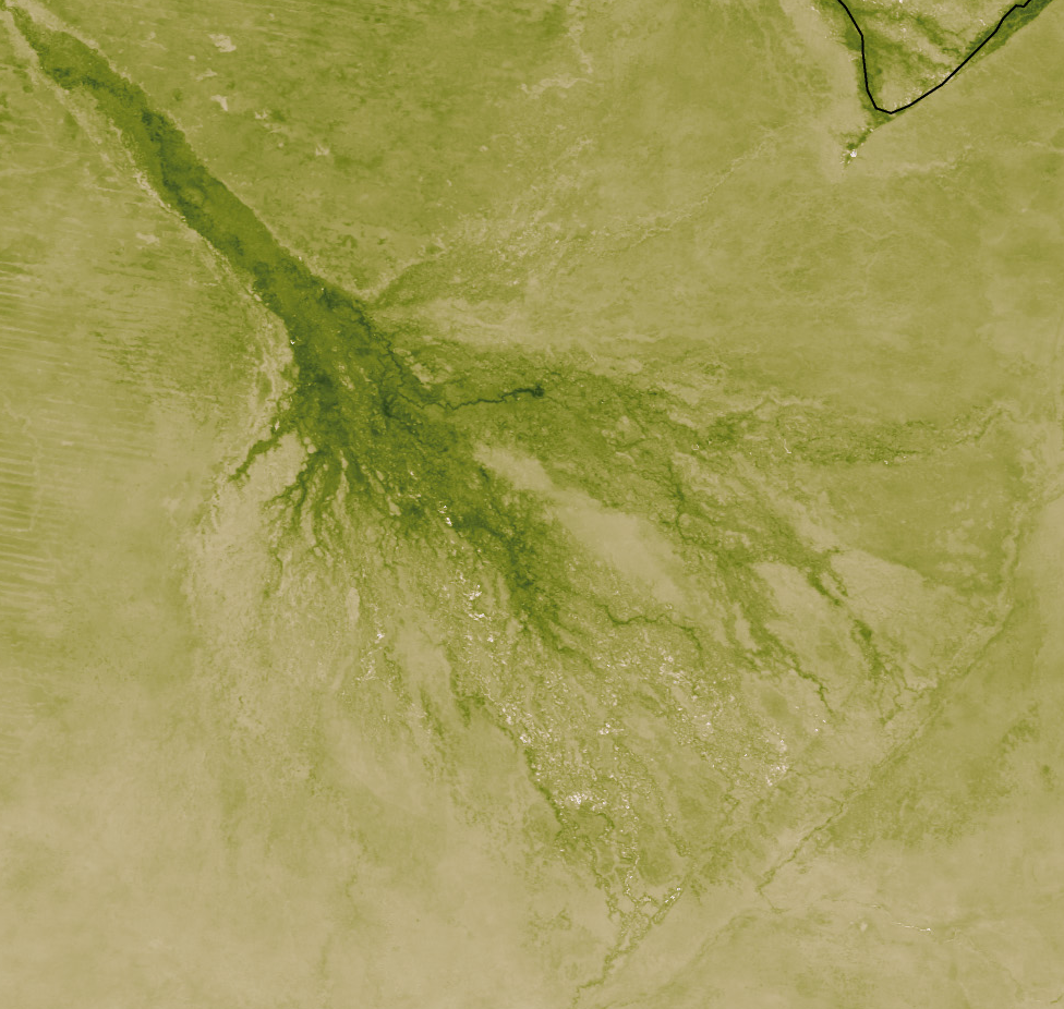 Okavangodelta